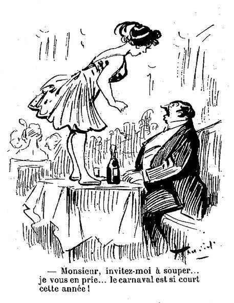 Dessin d'Henriot illustrant le Carnaval de Paris.